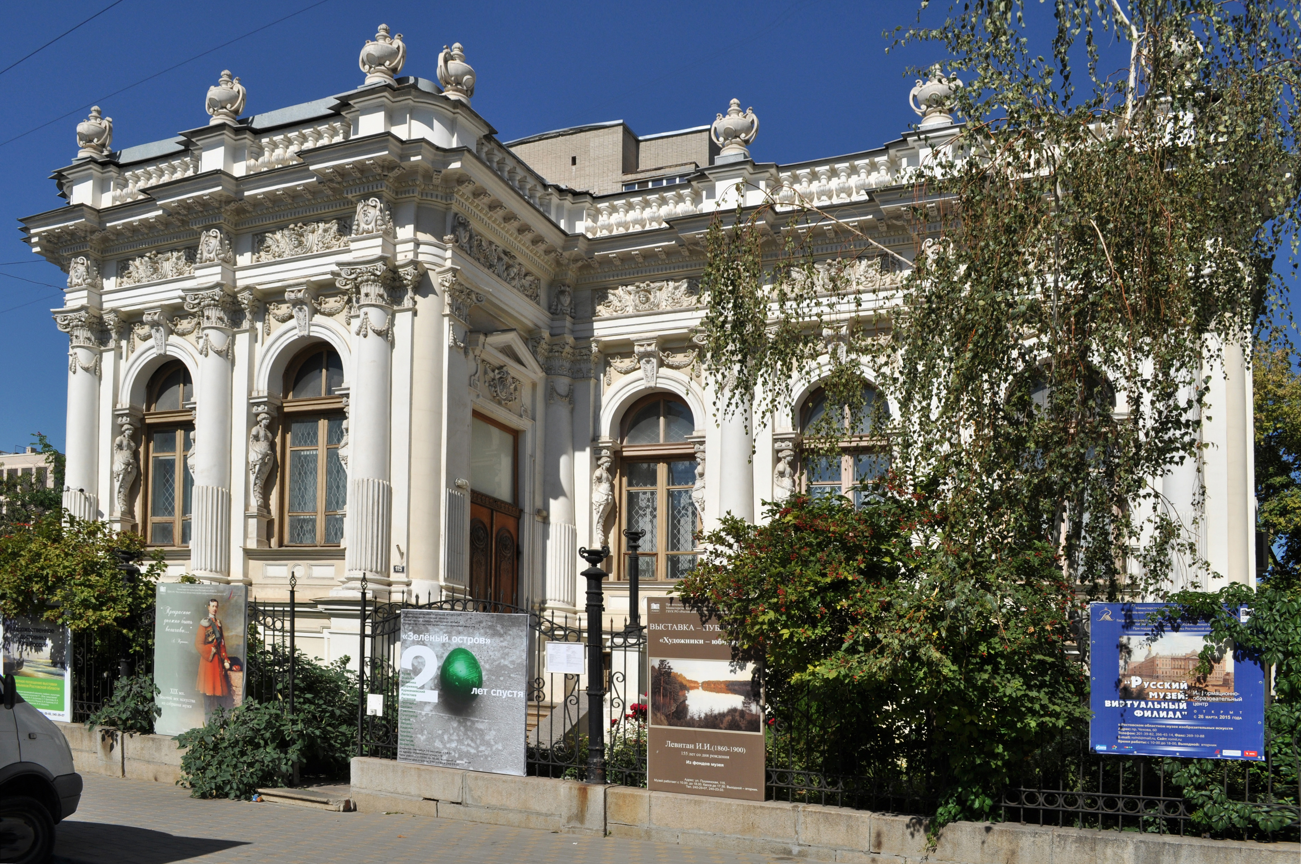 Особняк Домбровского: улица Пушкинская, 115, Ростов-на-Дону, Ростовская область